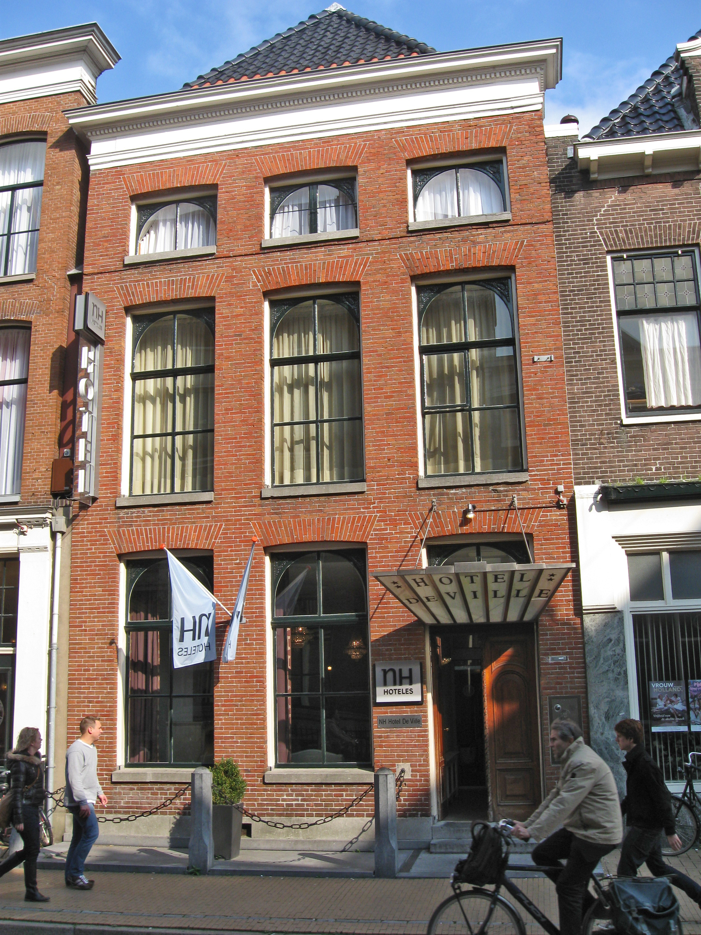 Groningen, Oude Boteringestraat 43, Pand met verdieping en lage zolderverdieping. Alle vensters zesruits, op begane-grond en verdieping half-cirkelvormig gesloten met gesneden zwikken. Bijpassende dubbele deur; rm 18620